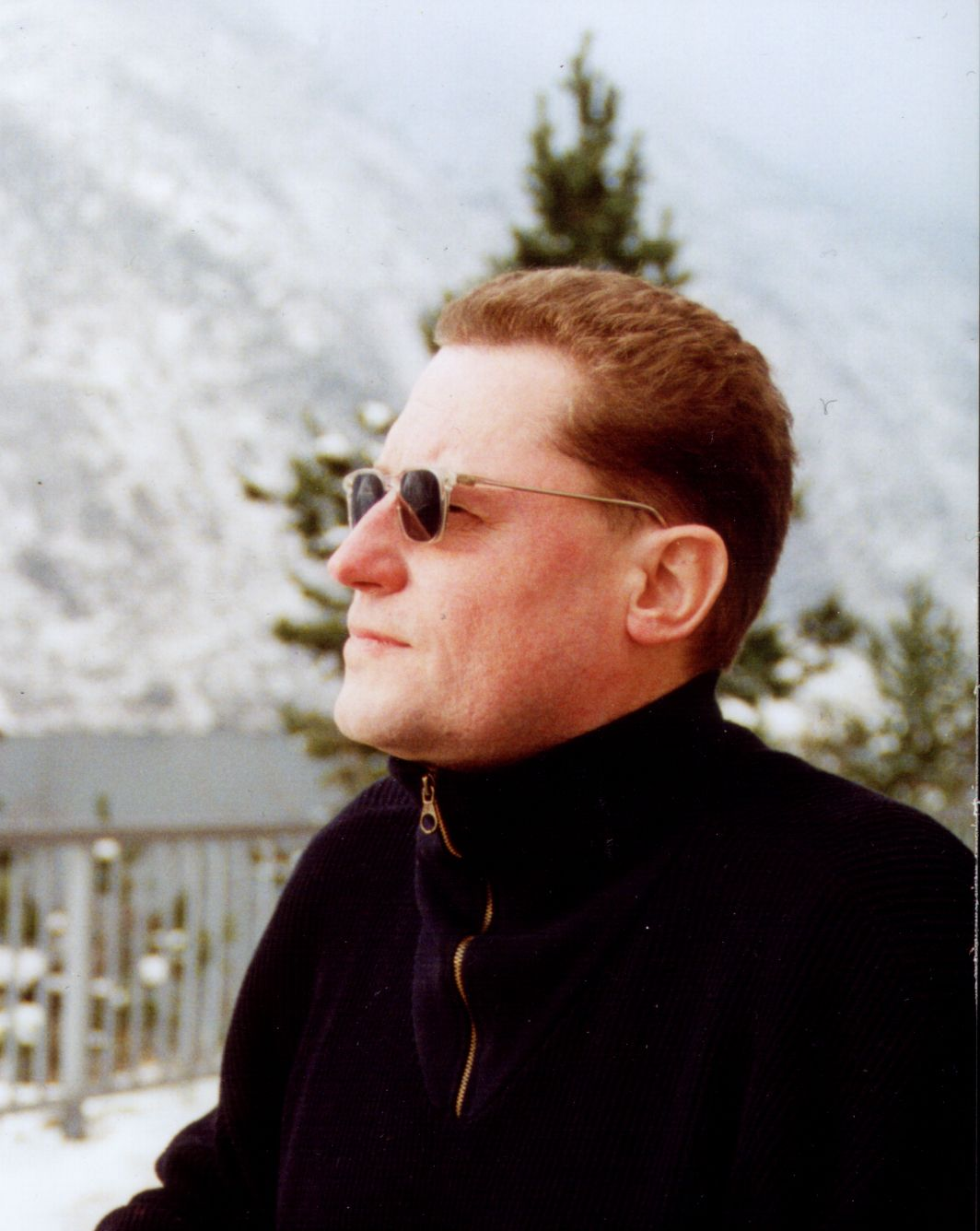 Jochen Berg am Gardasee